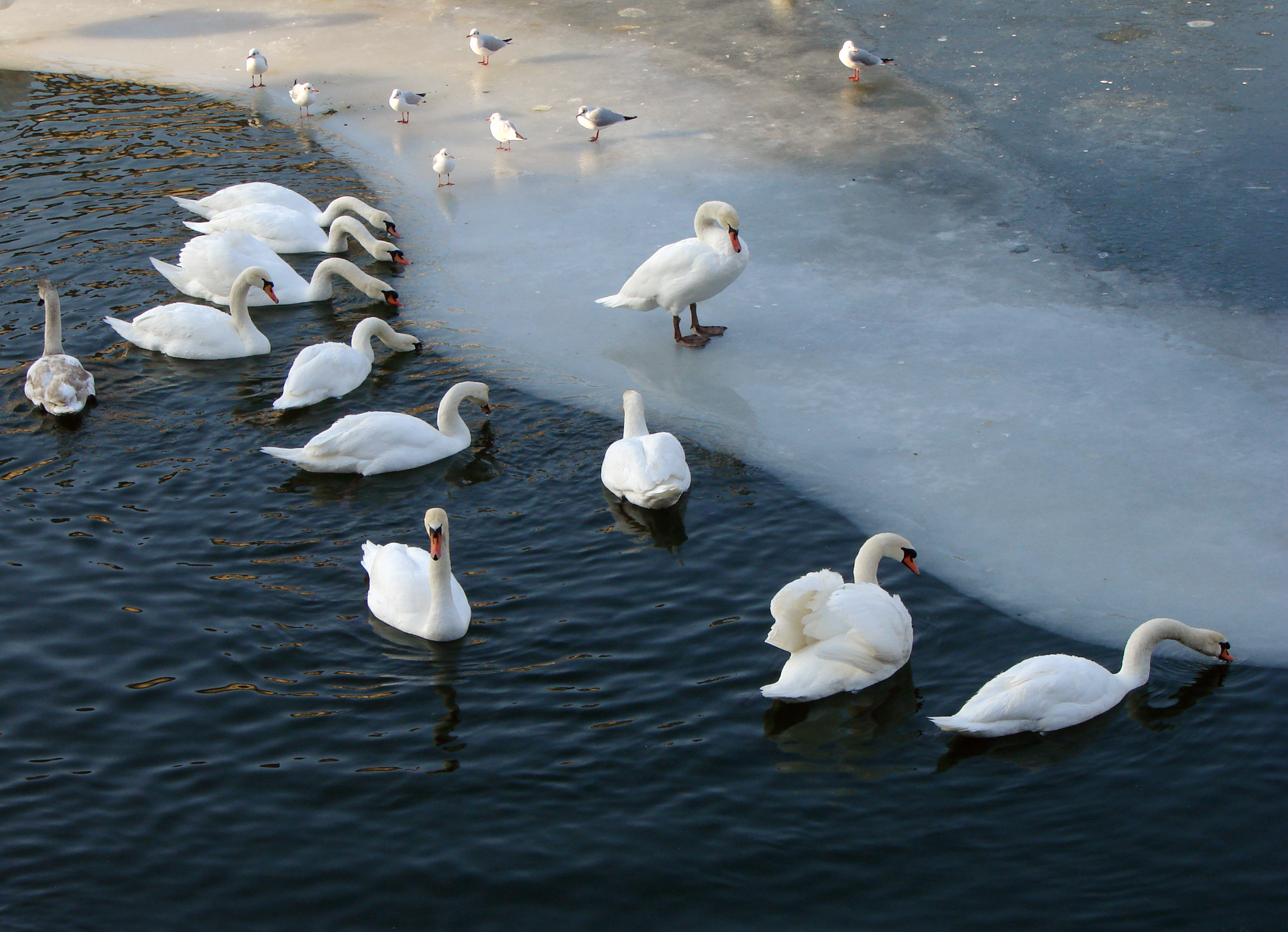 Cygnes tuberculés (Cygnus olor) et mouettes sur un bras de la Moselle partiellement gelé, à Metz.